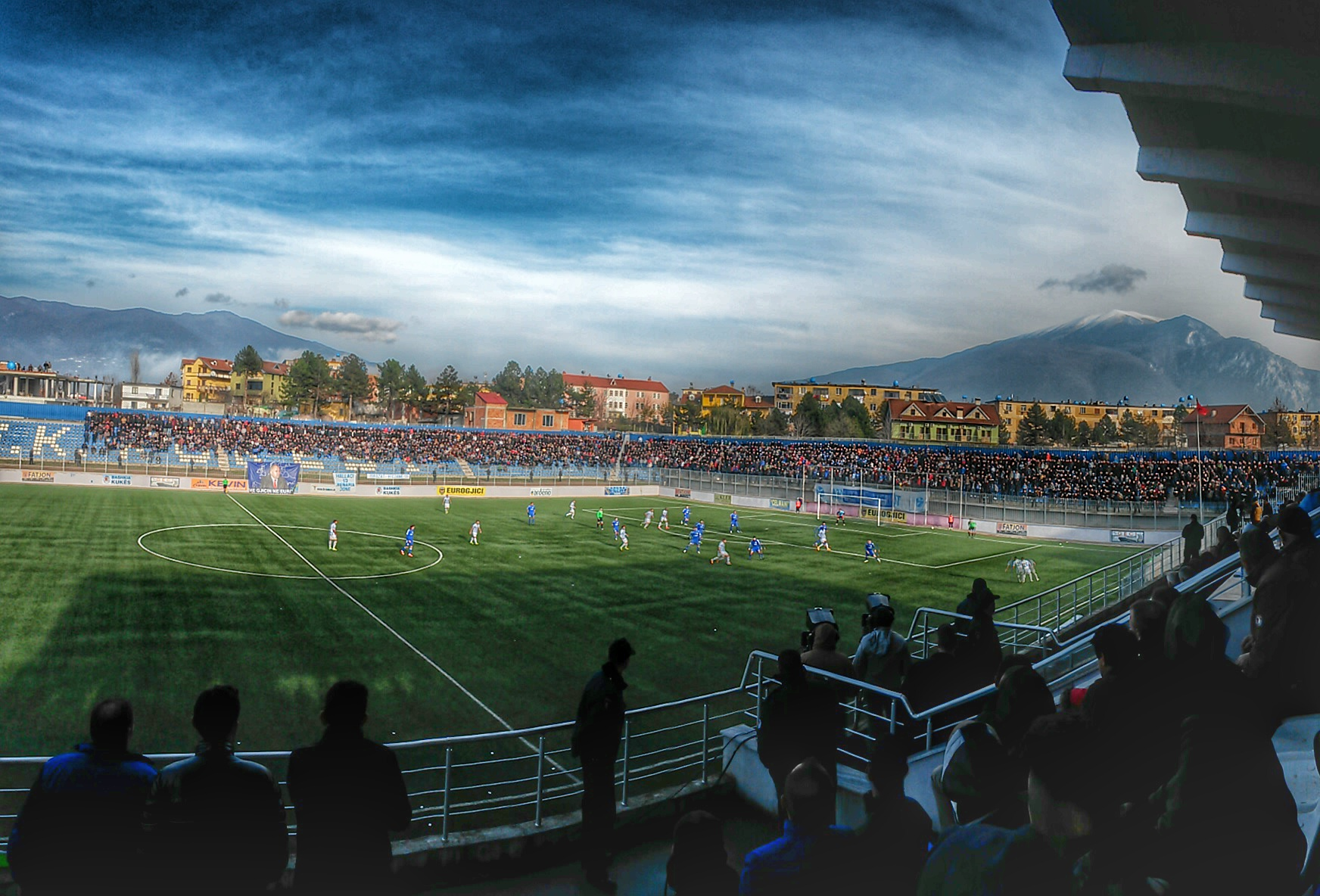 Njera foto eshte stadiumi Zeqir Ymeri i mbushur plot ne ndeshjen Fk.Kukesi -Kf.Tirana.